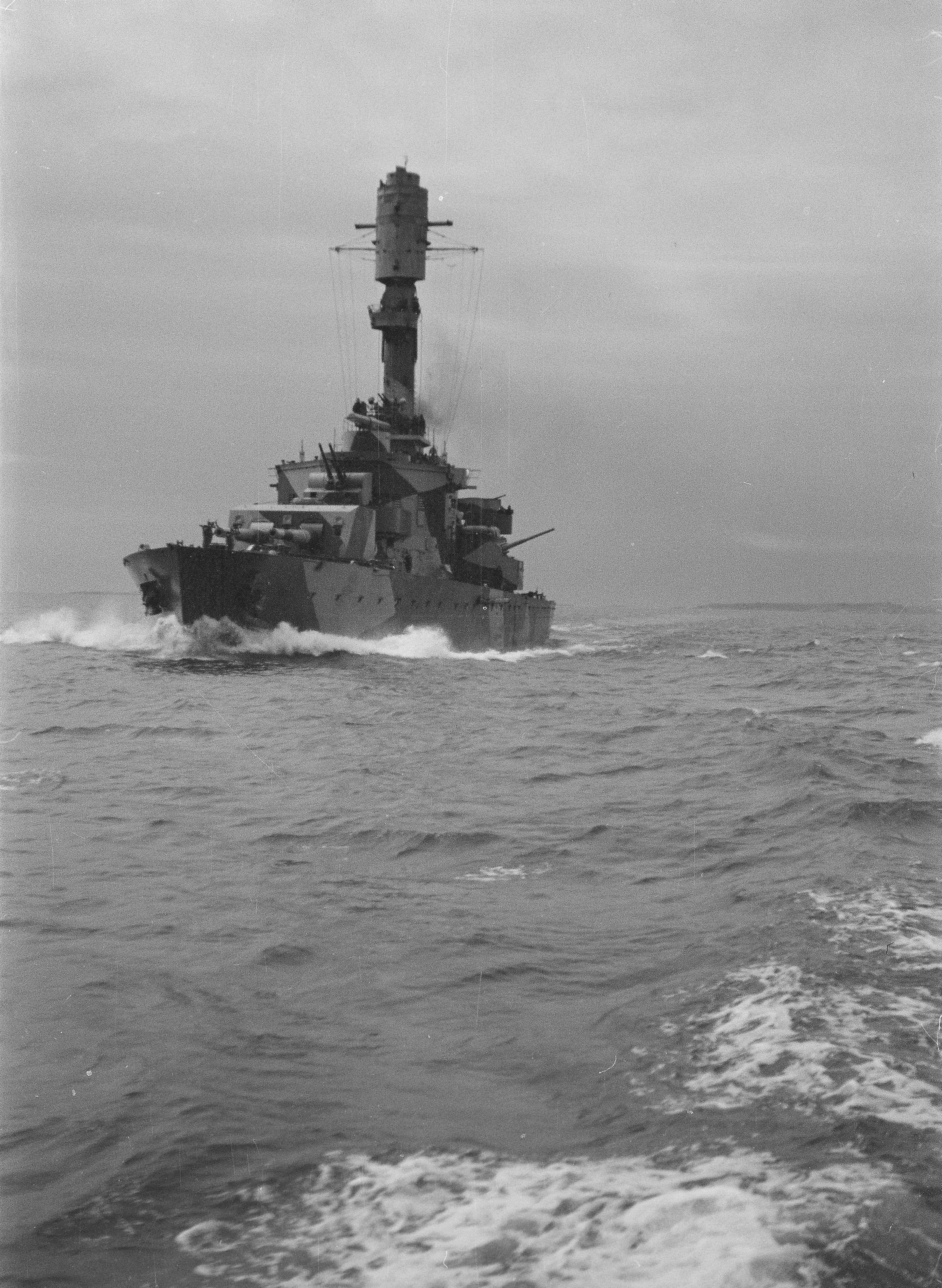 Panssarilaiva Väinämöinen täydessä vauhdissa. (Kuvauspaikka: Suomenlahti)